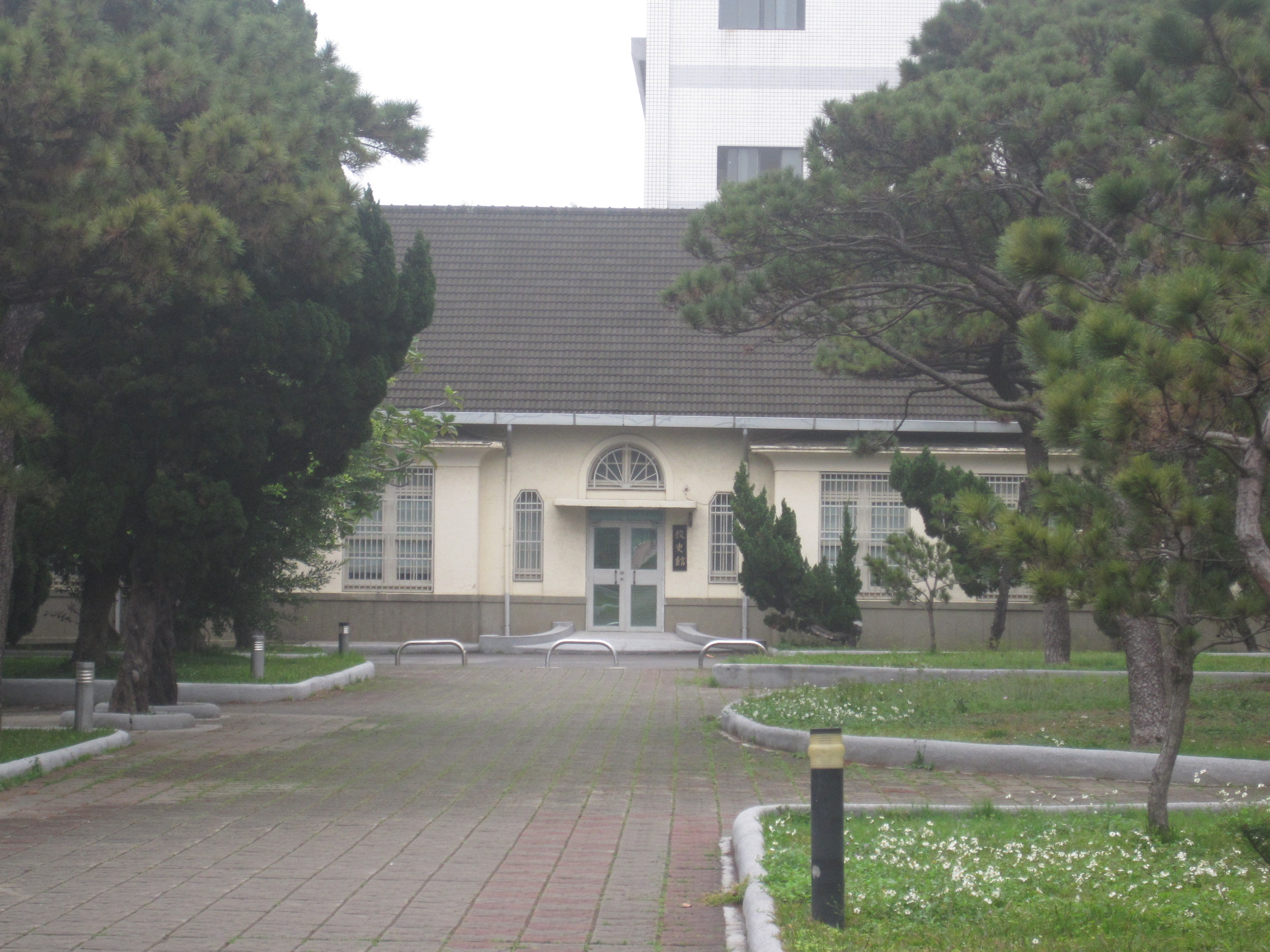 新竹高中校史館